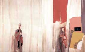 Reproduction d'un tableau de Maurice Matieu : l'impossibilité de peindre la guerre Huile sur toile et collage papier journal, 230x340 cm. 1966 1967